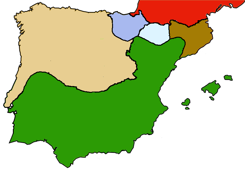 Mapa mut de la península ibèrica el 1100. Basat en [1]